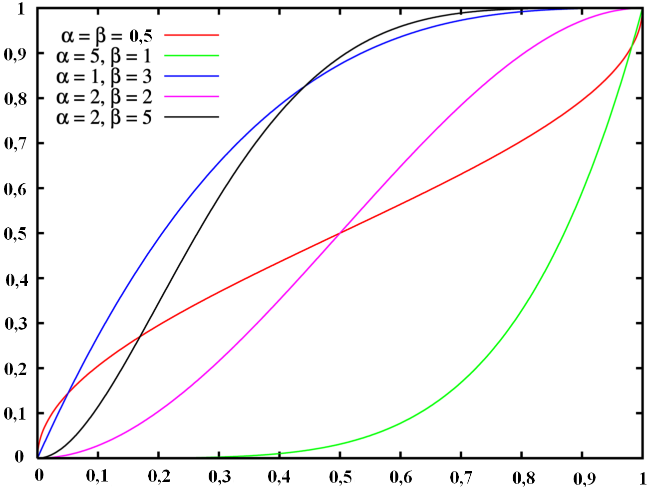 Zbirna funkcija verjetnosti porazdelitve beta.